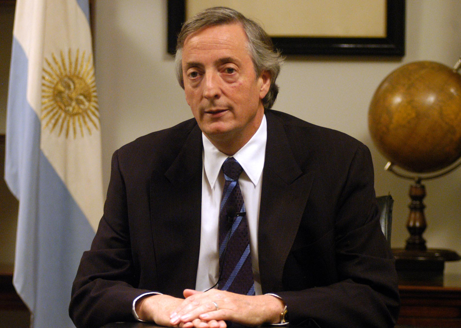 Mensaje del Presidente de la Nacion, Néstor Kirchner, con motivo del fallecimiento de S.S. Juan Pablo II.